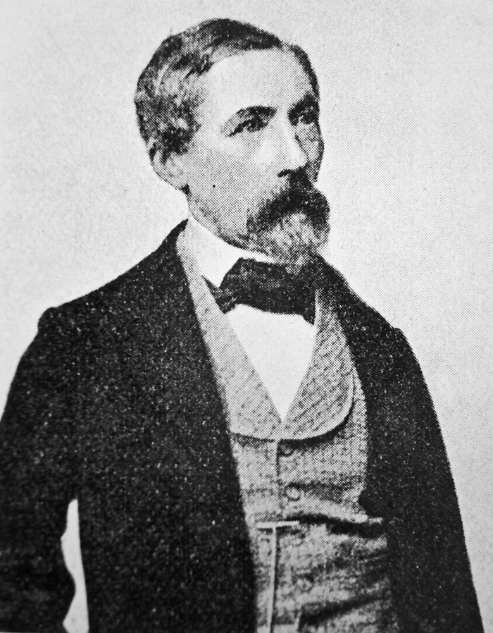 Friedrich David Groneweg (* 5. Juli 1805 in Oerlinghausen, † 20. März 1886 in Gütersloh), Mitglied der liberalen Fortschrittspartei, ab 1849 als Abgeordneter des Wahlkreises Wiedenbrück im Berliner Abgeordnetenhaus